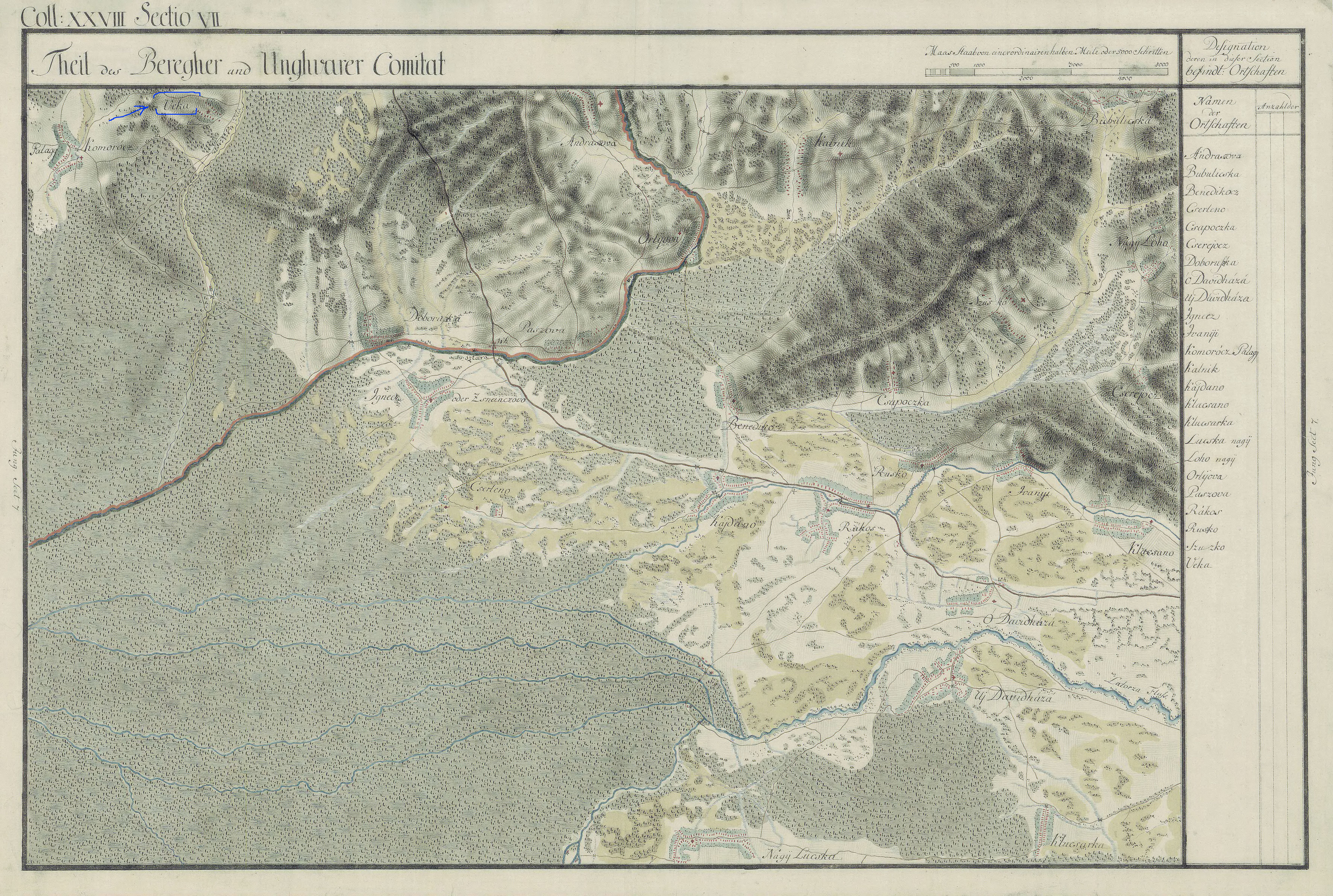 Австрійська карта 18 ст. (1782-1787) де вказано назва села Вовкове (Veka)